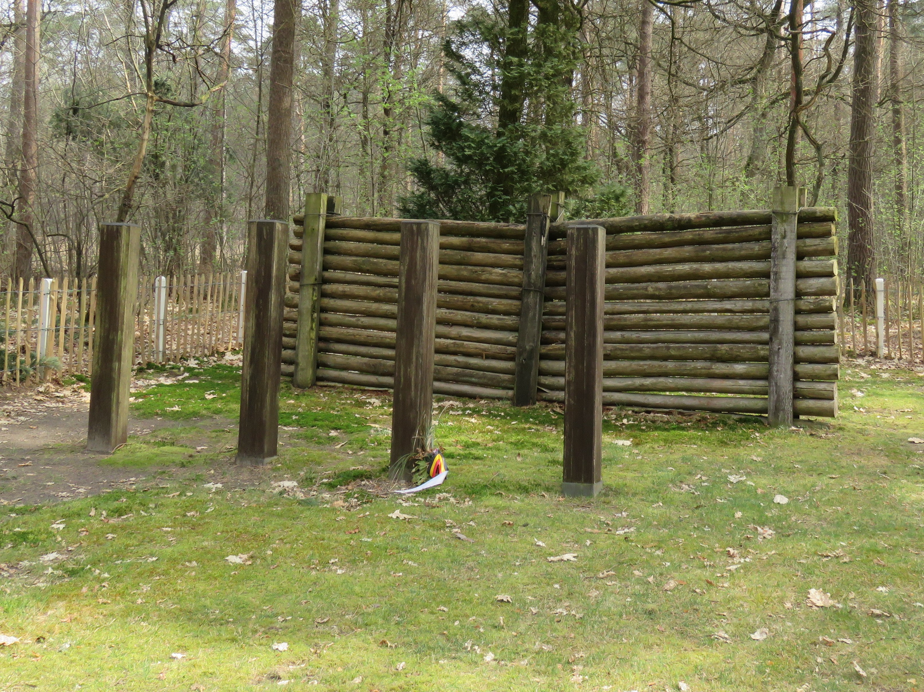 Executiepalen en kogelvanger van Executieoord Hechtel